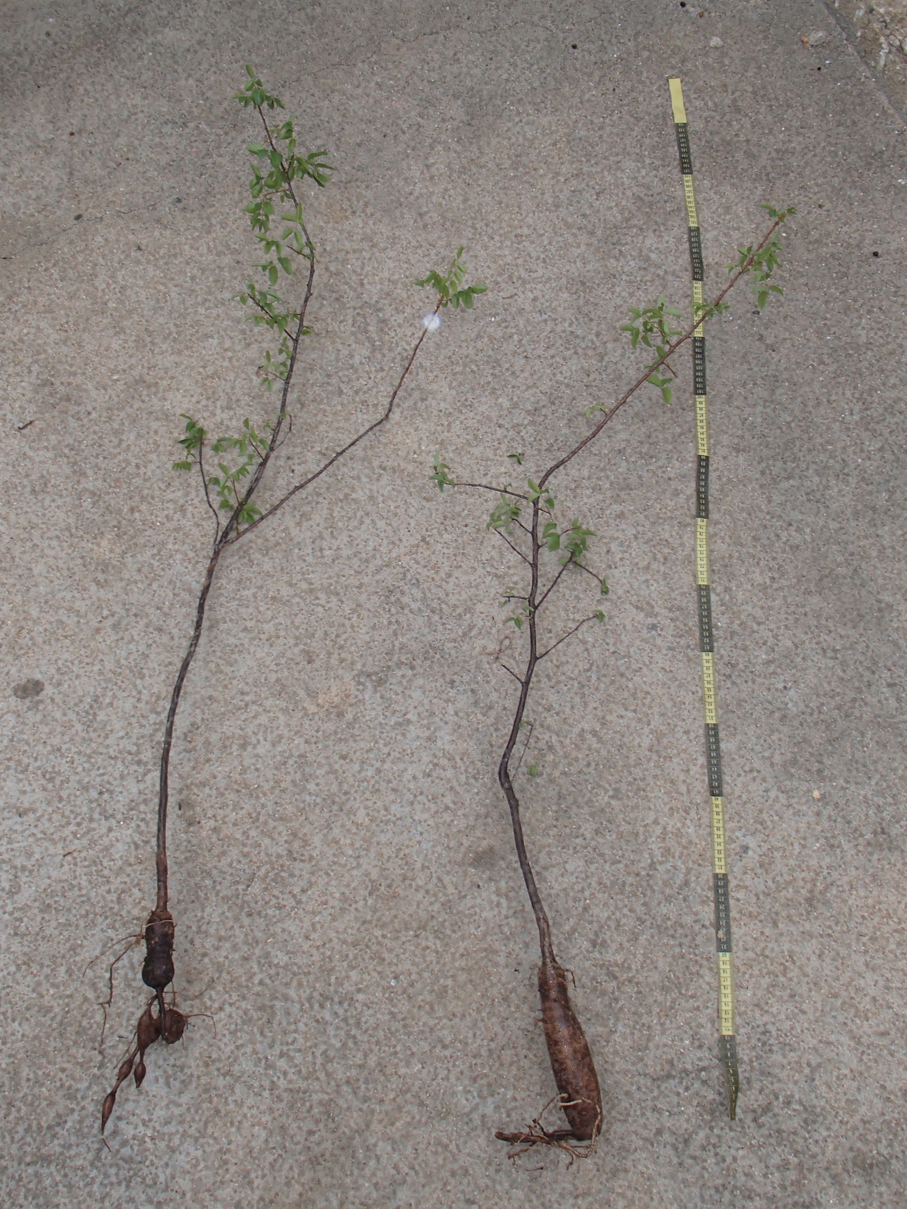 Three-years-old St sapling with root tubers. Petrolândia, PE, Brazil.